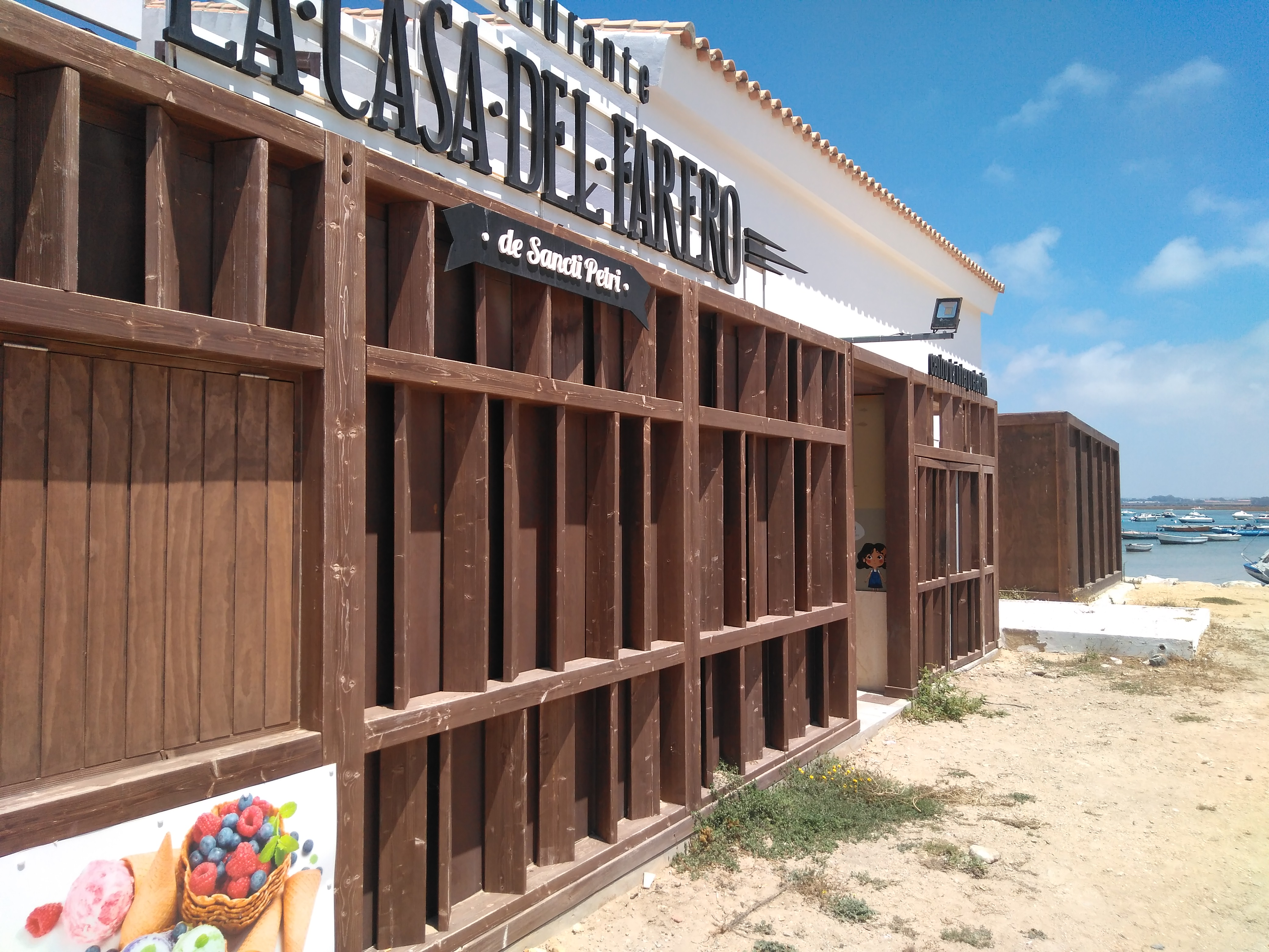 centro interpretación del Poblado Sancti Petri en el restaurante "La Casa del Farero", Chiclana de la Frontera (Andalucía, España)